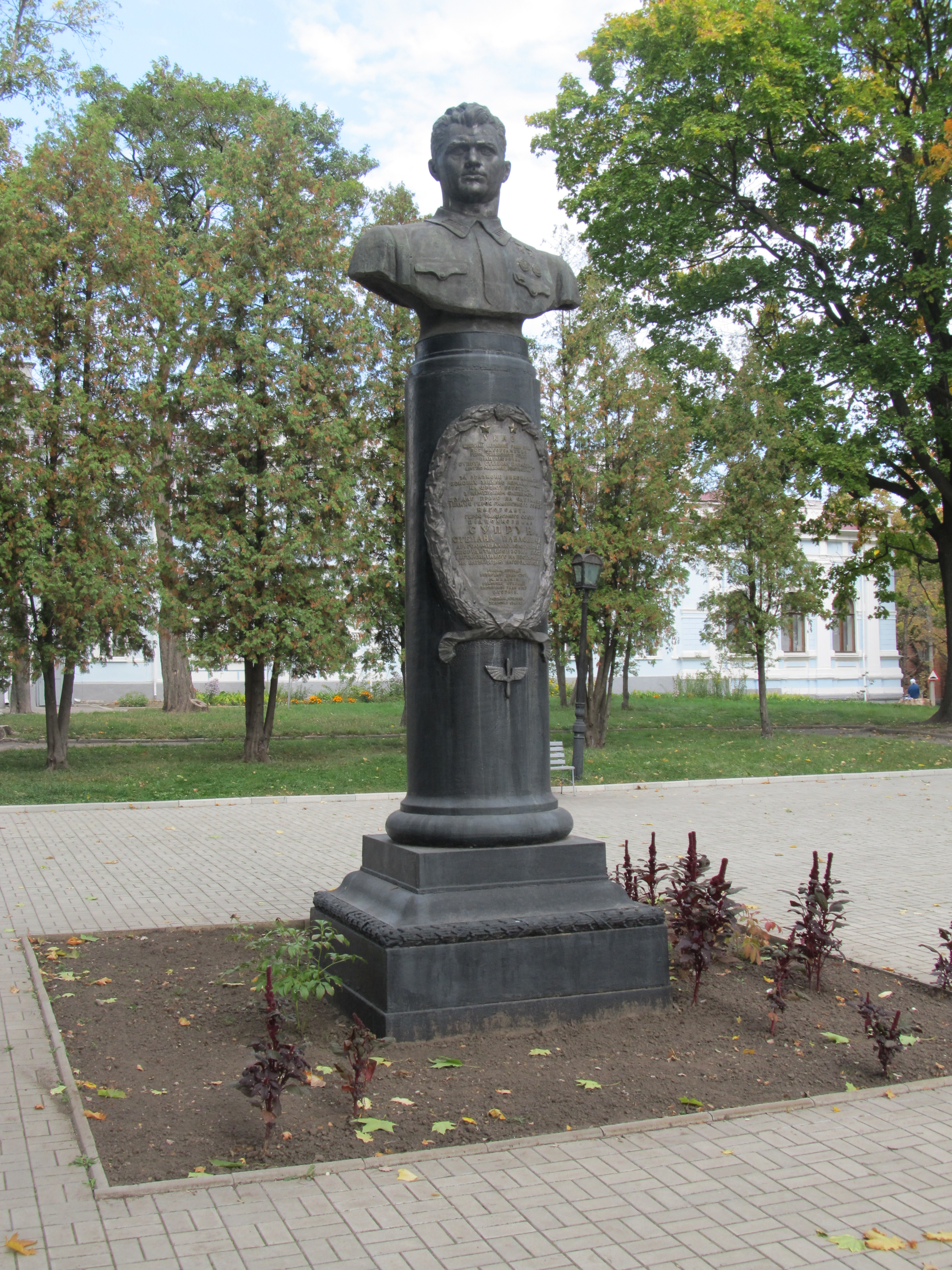 Пам’ятник С.П. Супруну – Герою Радянського Союзу в Сумах